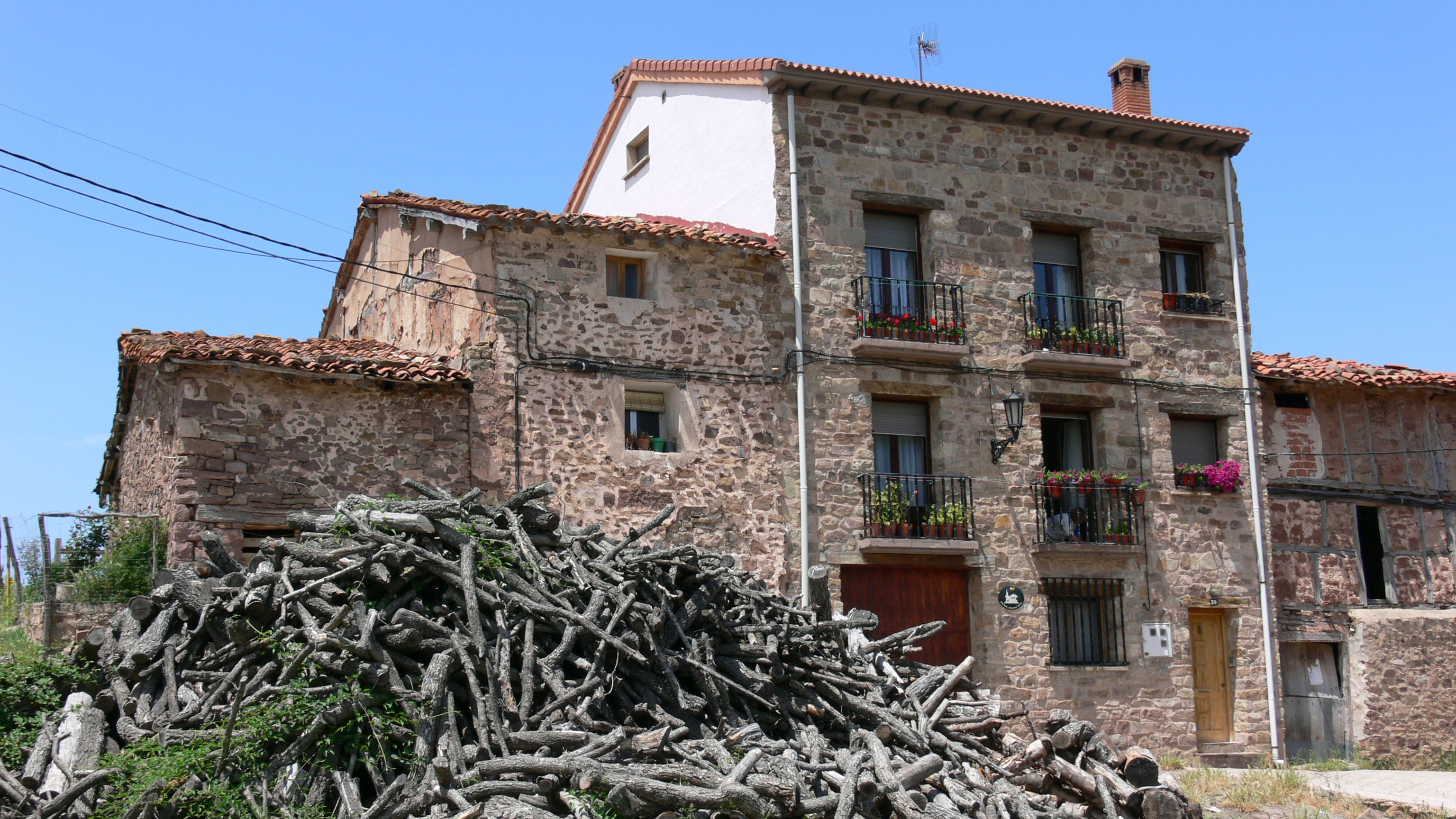 Centro urbano del pueblo.